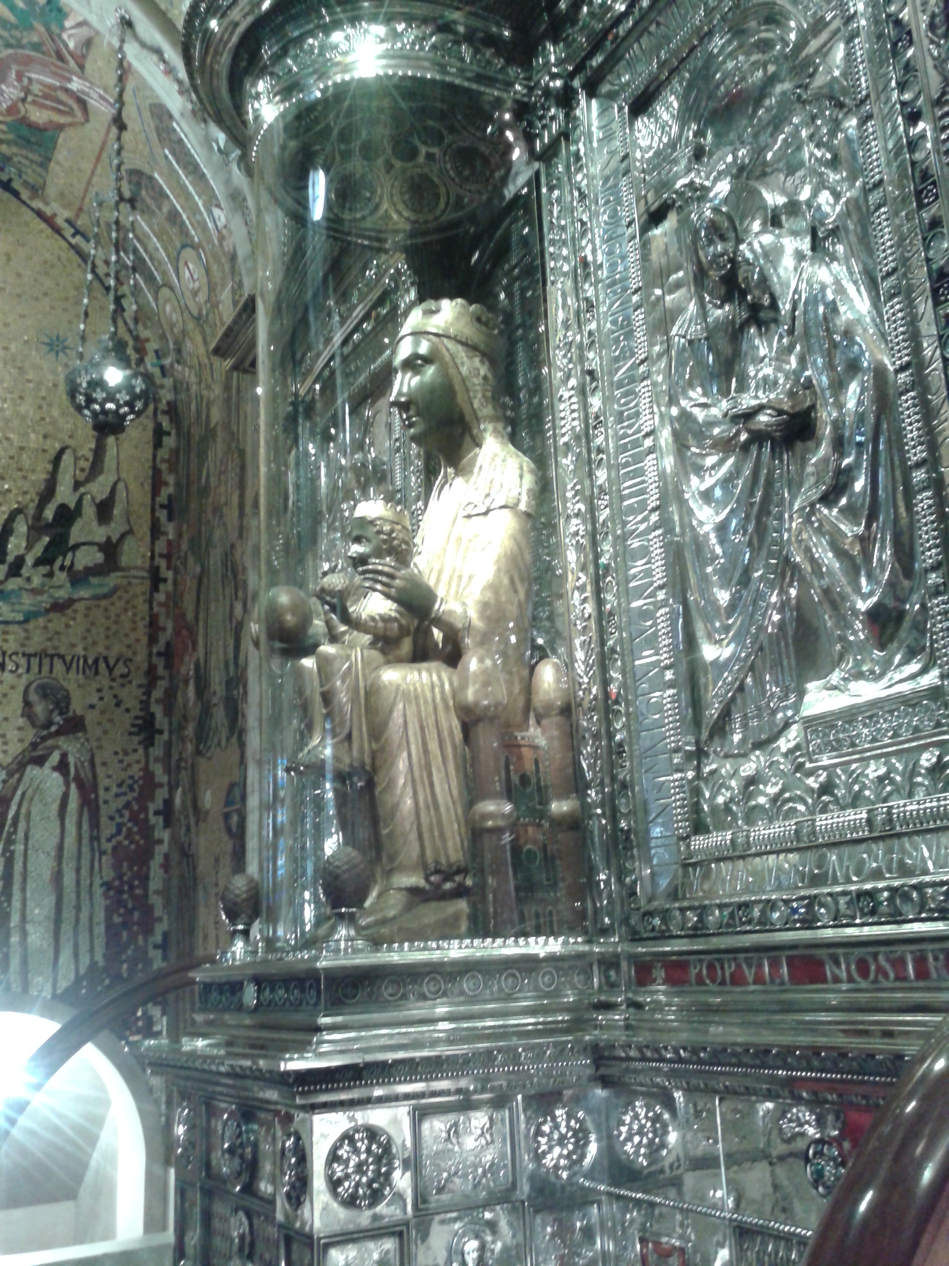 Մոնսերրատի Սուրբ Մարիամ